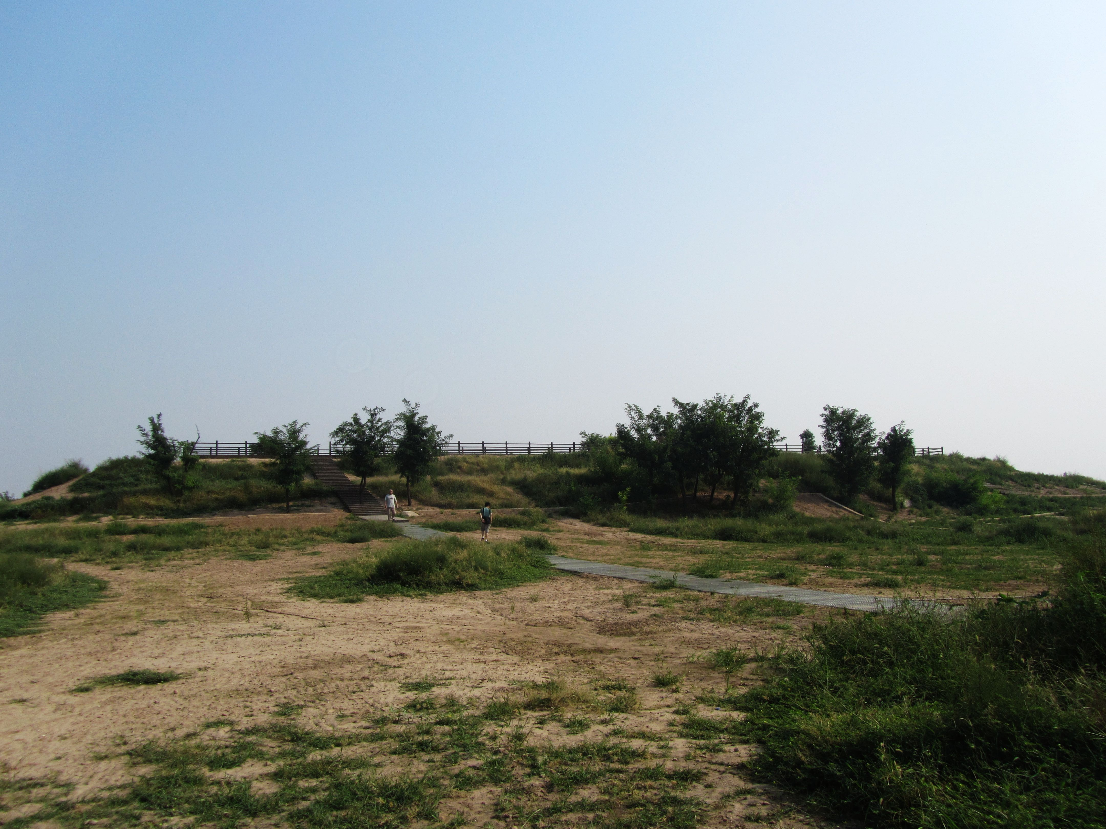 汉长安城遗址之1号建筑-未央宫前殿遗址。